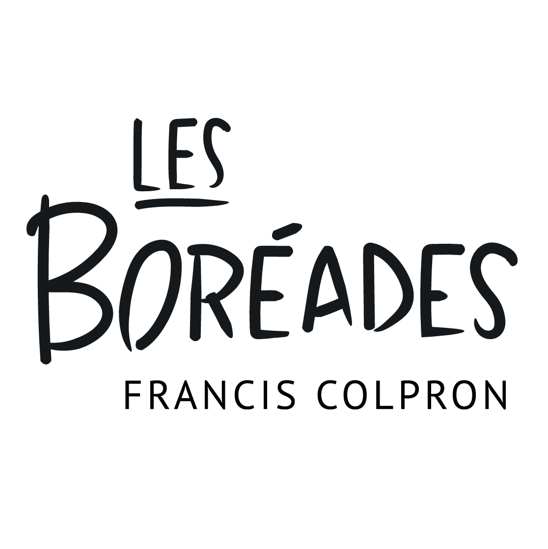 Logo de l'ensemble les Boréades de Montréal sous la direction de Francis Colpron.